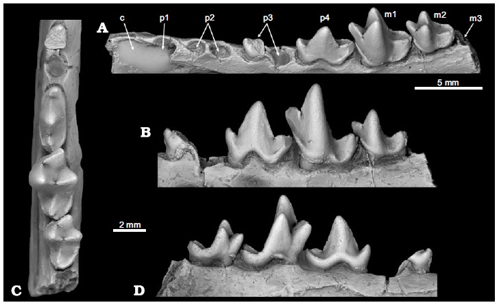 “Miacid” carnivoran Gracilocyon winkleri (Gingerich, 1983) comb. nov., from the early Eocene of the Willwood formation, locality Sc−210 (Wa−2), Clark’s Fork basin, Wyoming, USA,UM75432 (holotype). Left dentary with p4–m2 in oblique labial (A), labial (B), occlusal (C), and lingual (D) views.